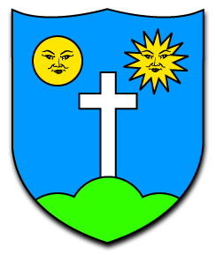 Wappen von Eggerberg Kanton Wallis